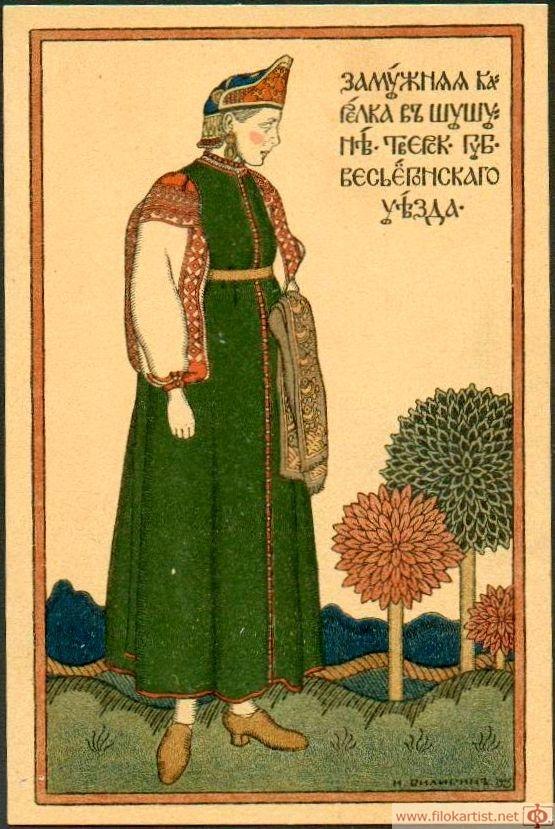 Замужняя карелка в шушуне. Тверск. губ. Весьегонскаго уезда Билибин Иван Яковлевич Издание Общ. Св. Евгении